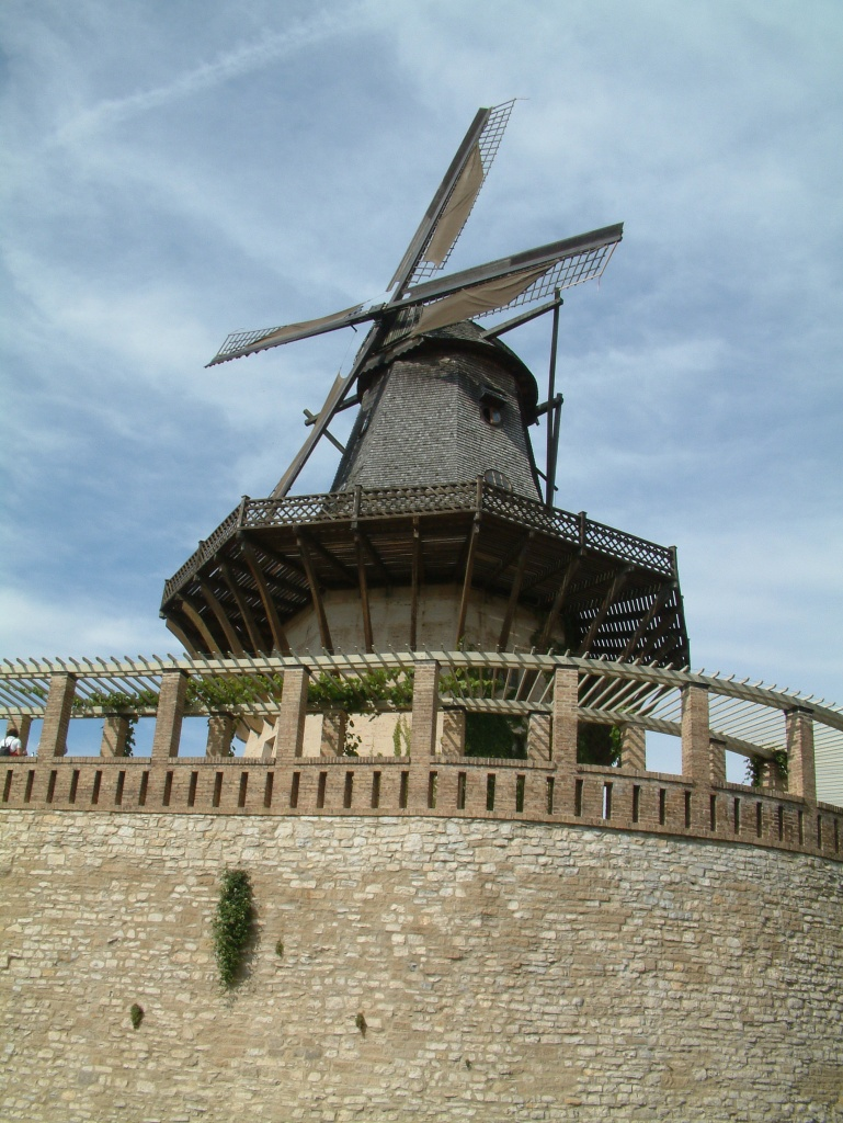 Historische Mühle von Sanssouci Copyright Status: GNU Freie Dokumentationslizenz